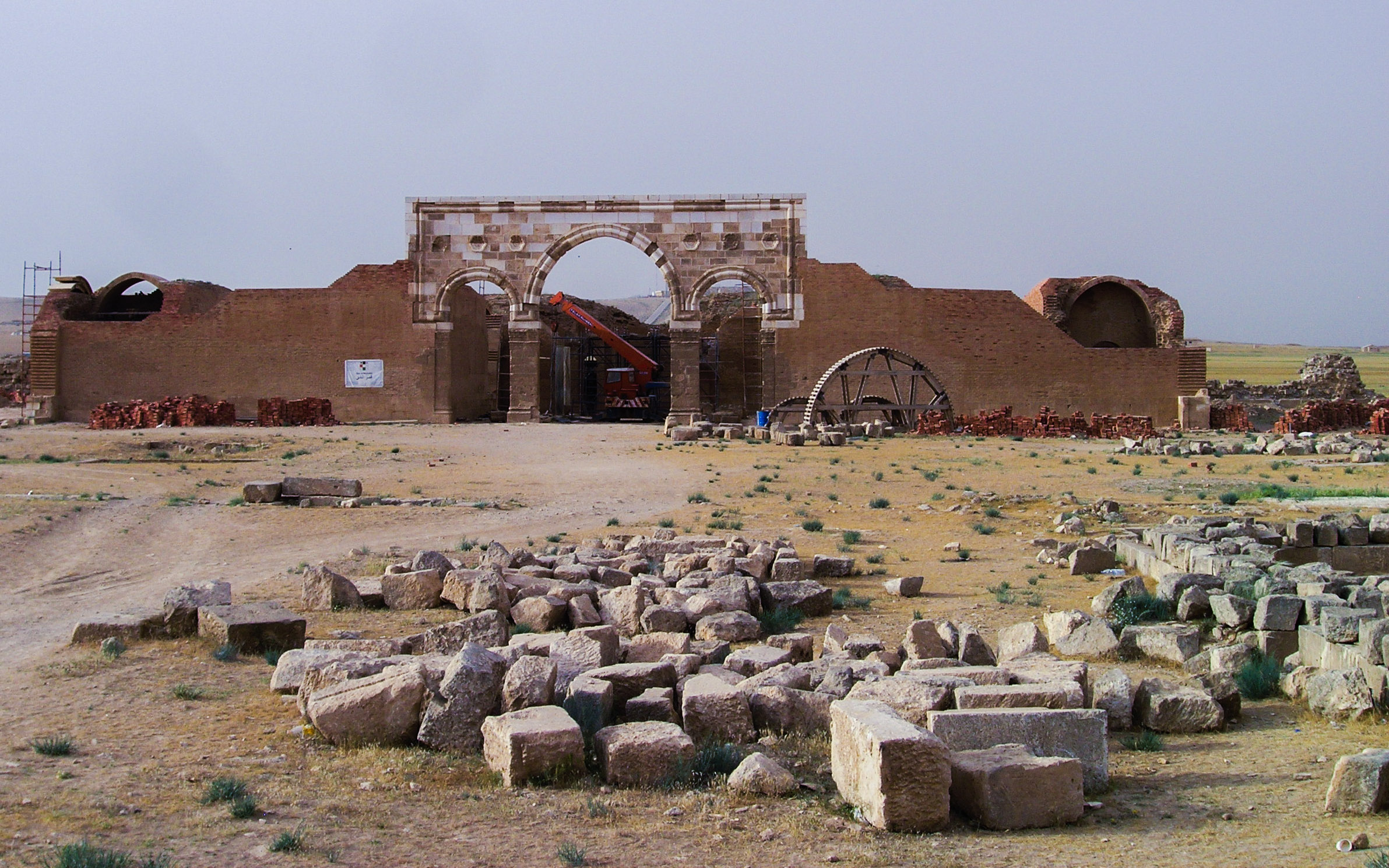 Mshatta - umayyadisches Wüstenschloss in Jordanien. Front mit aufgerichtetem Tor.